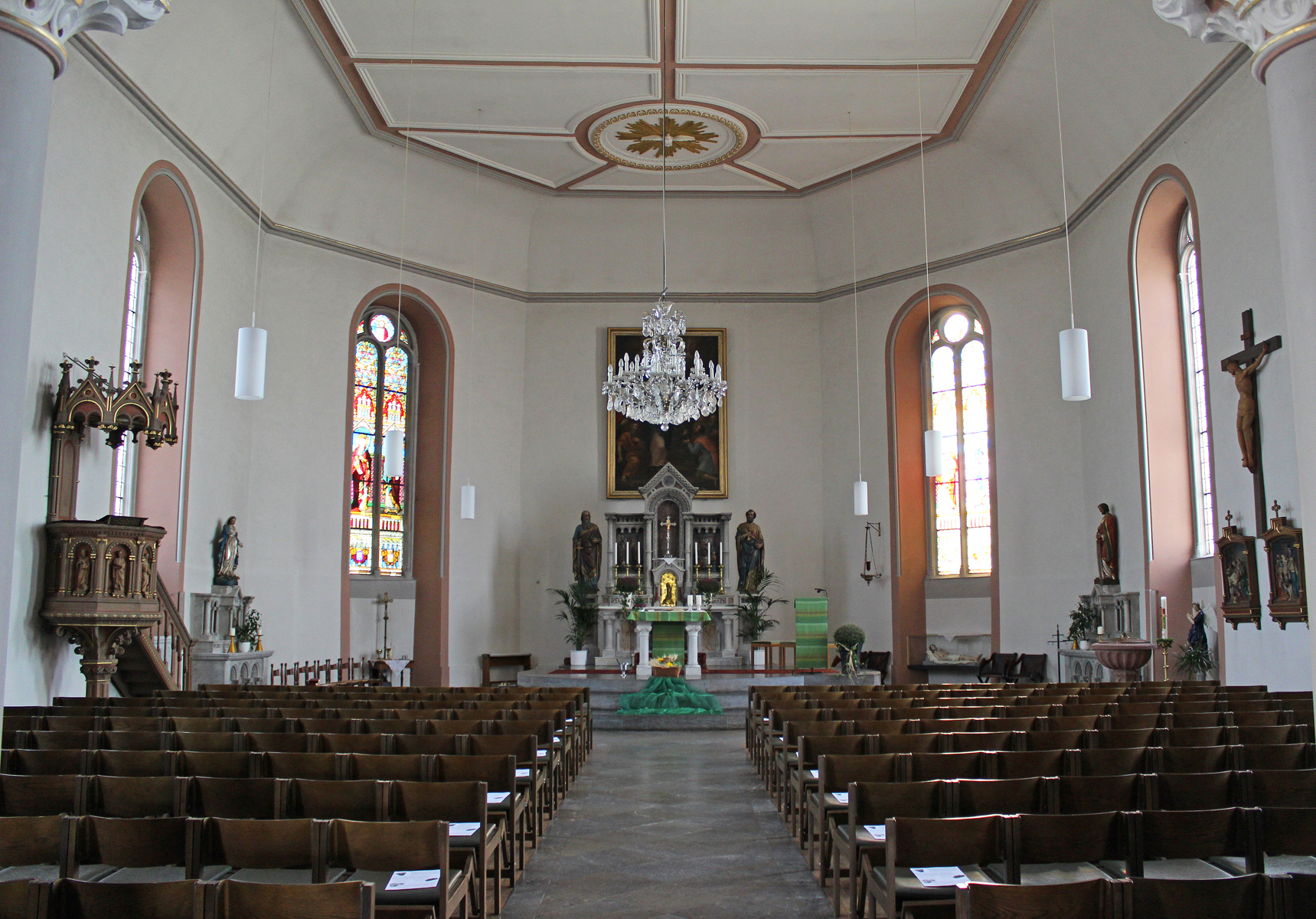 Blick ins Innere der kath. Pfarrkirche St. Petrus und Paulus in Beaumarais, Stadt Saarlouis, Saarland